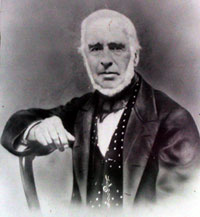 Portrait d'Alphonse Sagebien